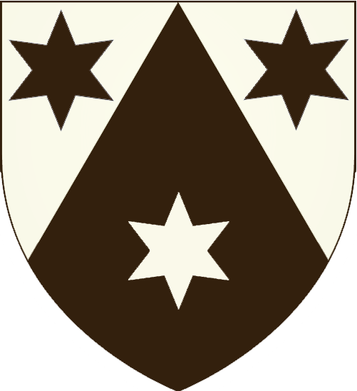 Carmelites.